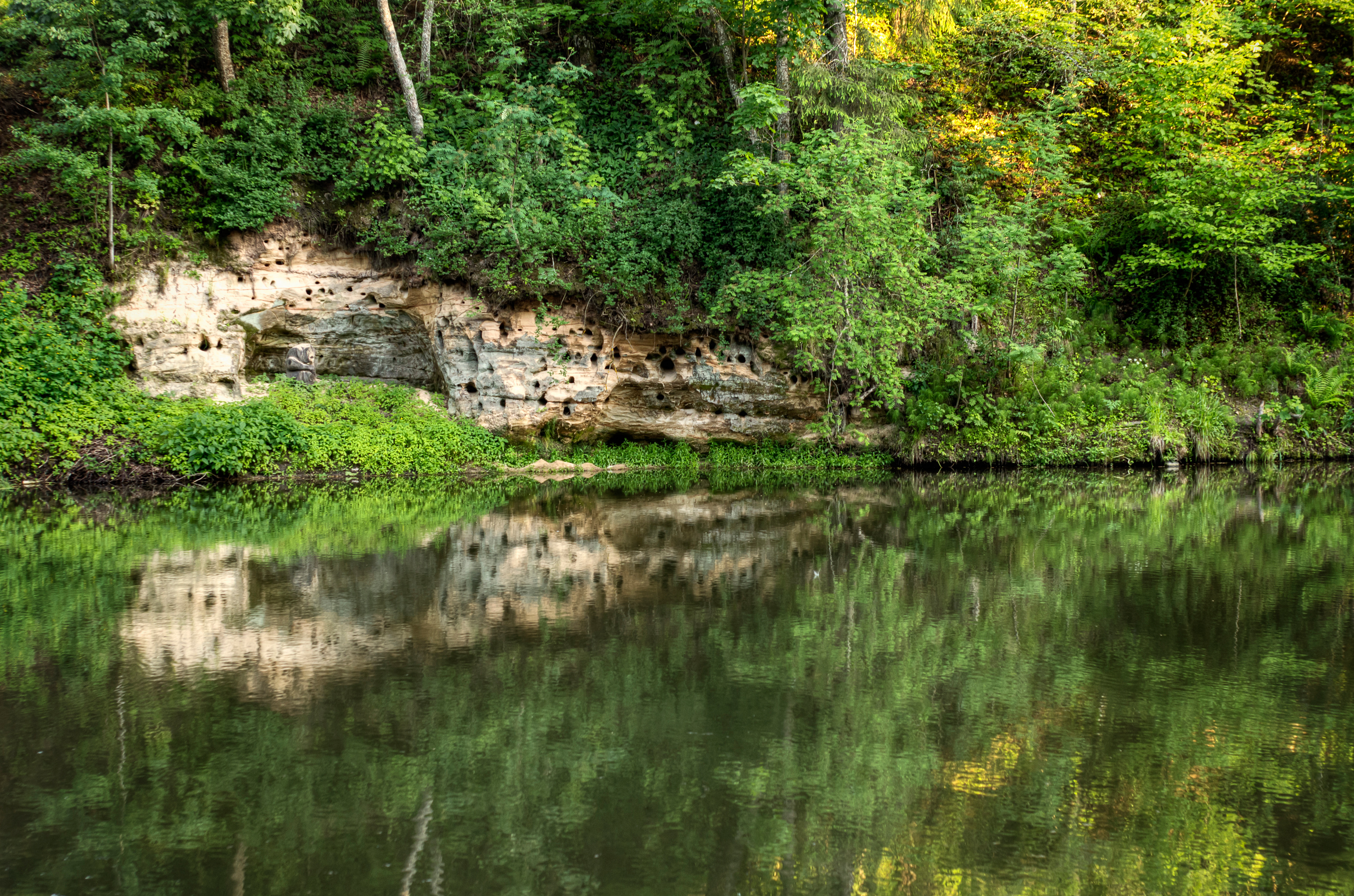 Paljand Tikste ürgorus.